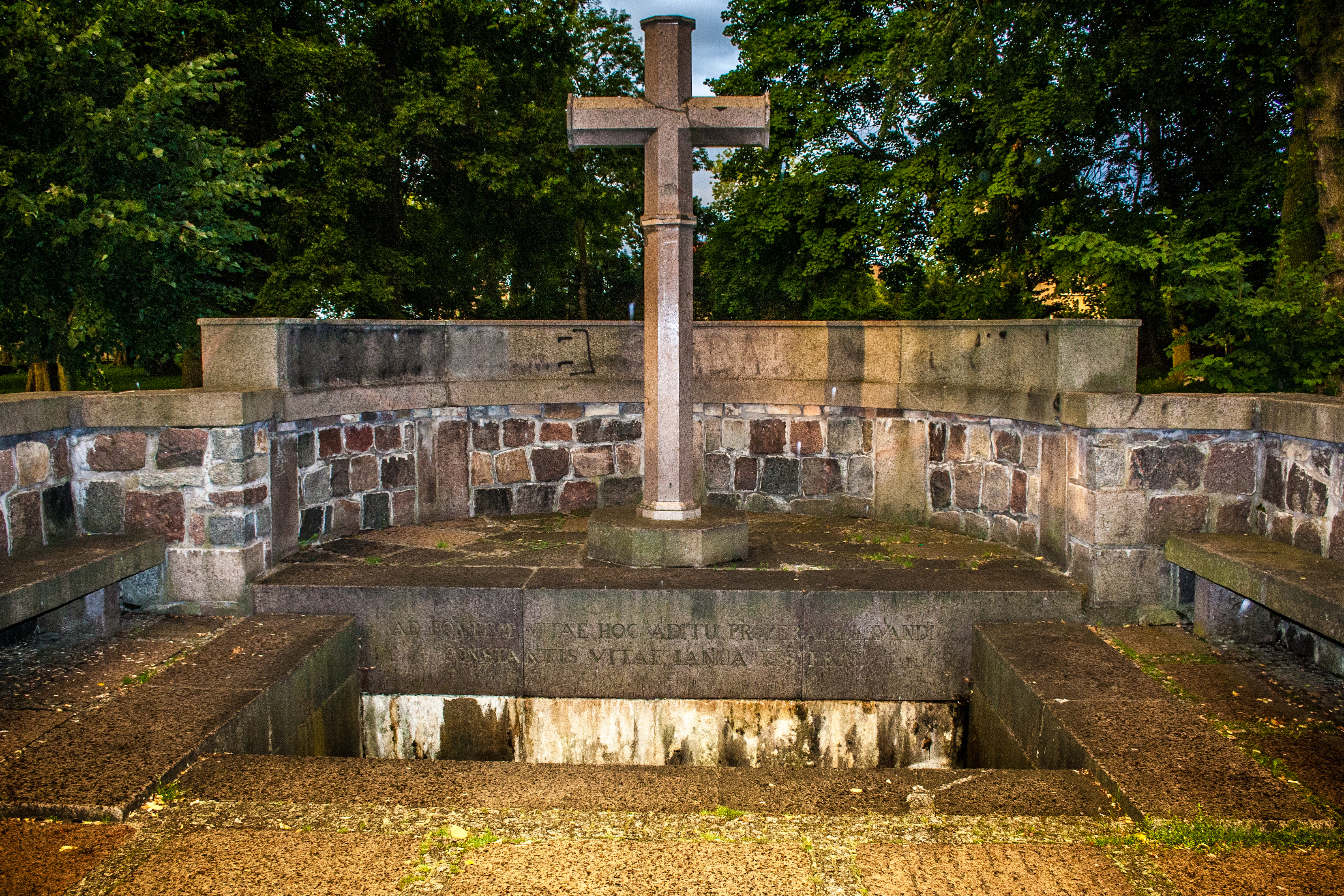 Pyrzyce, studnia św. Ottona (miejsce chrztu Pyrzyczan), 1825-1826